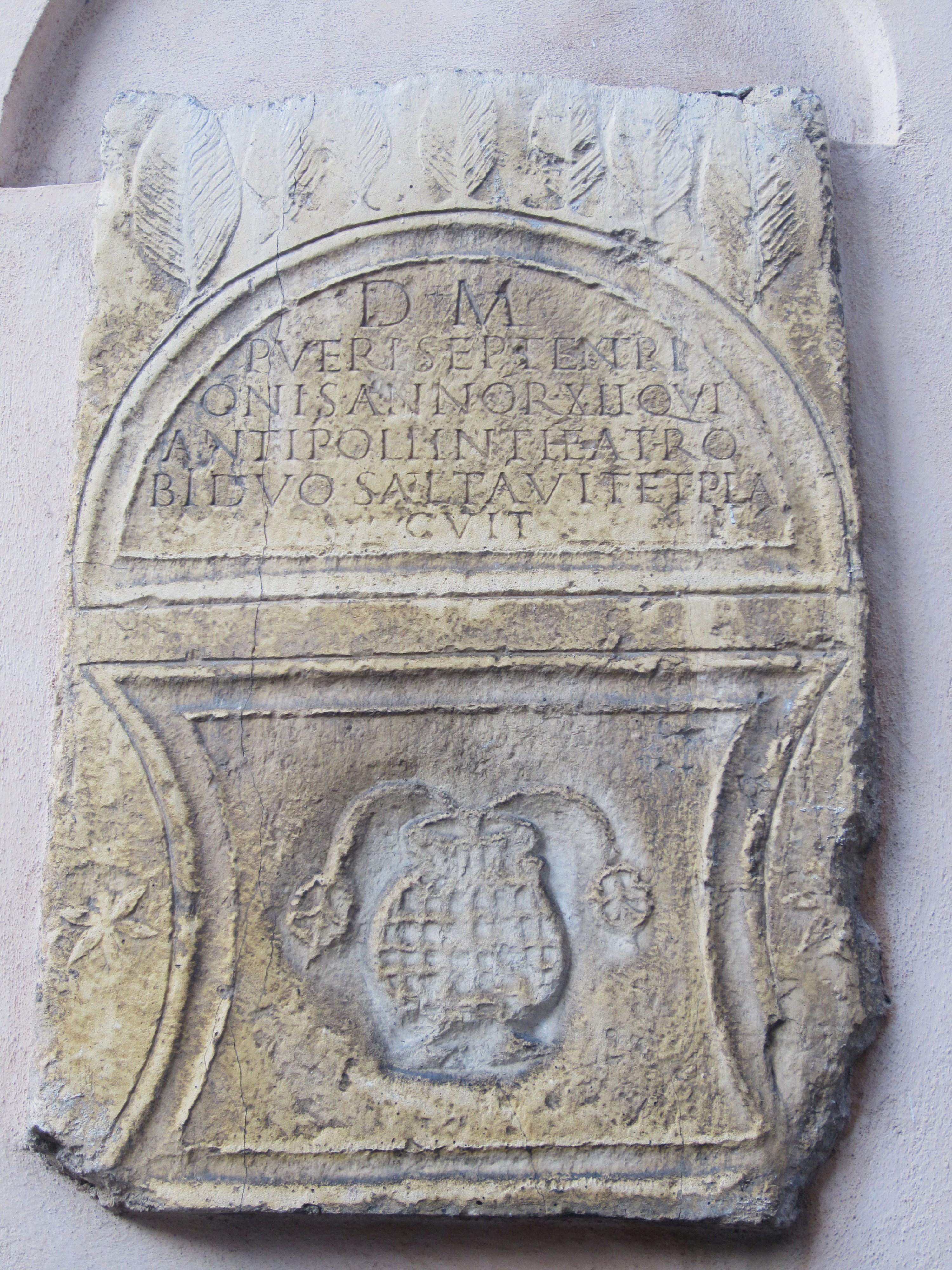 Description stèle funéraire de l'enfant Septentrion Antibes Date04 decembre 2011Sourcemon appareil photoAuthorAimelaimePermission (Reusing this file) stèle funéraire de l'enfant Septentrion Antibes